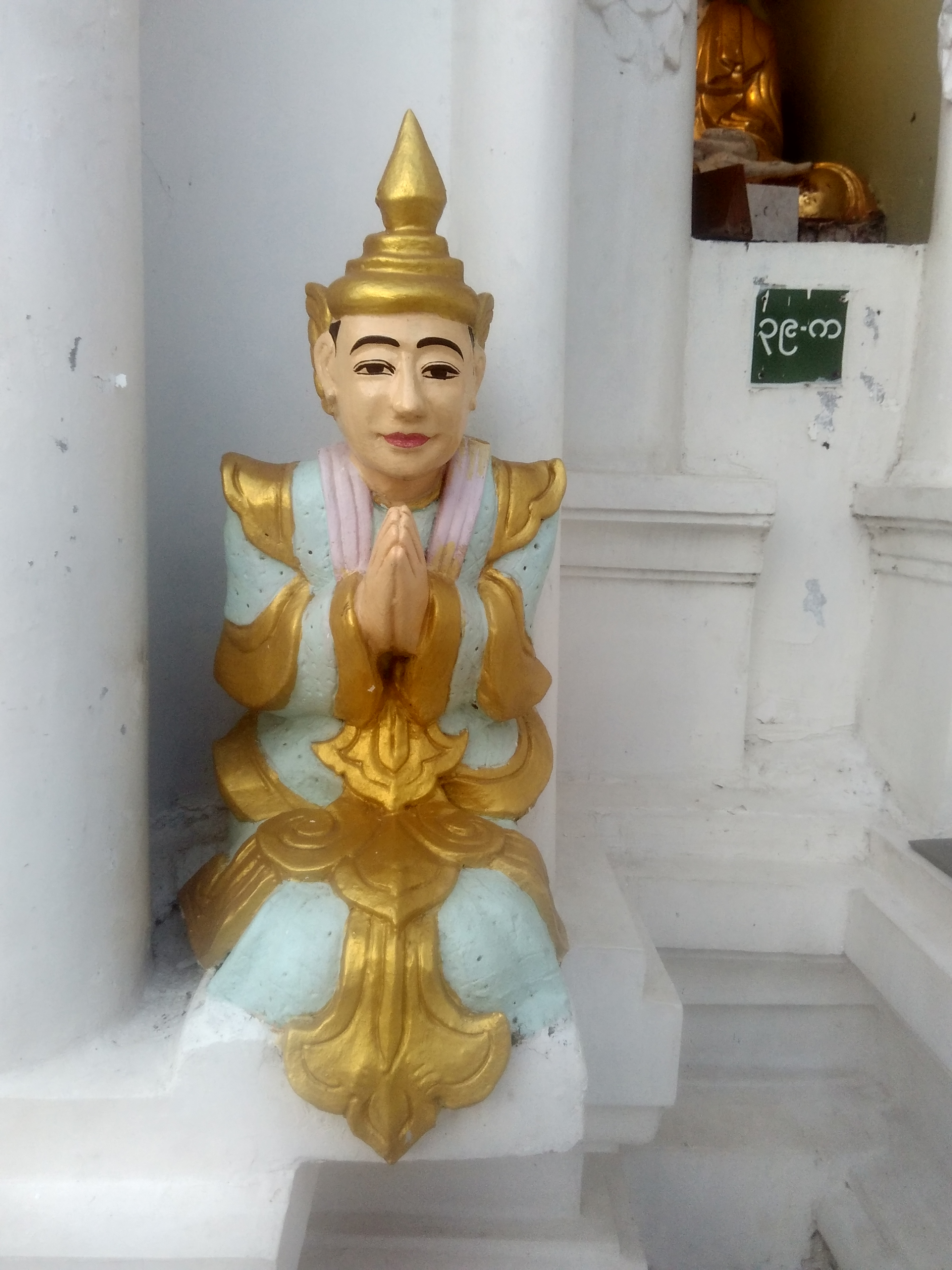 နတ်ရုပ်။ ရွှေတိဂုံစေတီတော်တွင် ရိုက်ကူးသည်။